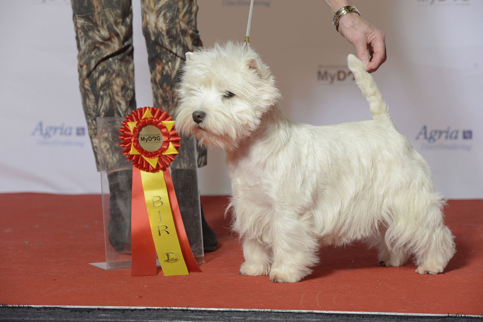 Grupp 3, WEST HIGHLAND WHITE TERRIER, Divine And Smash Devil In Disguise MyDOG, nordens största hundevenemang.